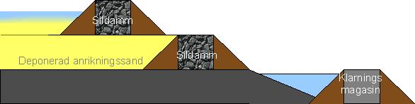 Sedimentationsdamm